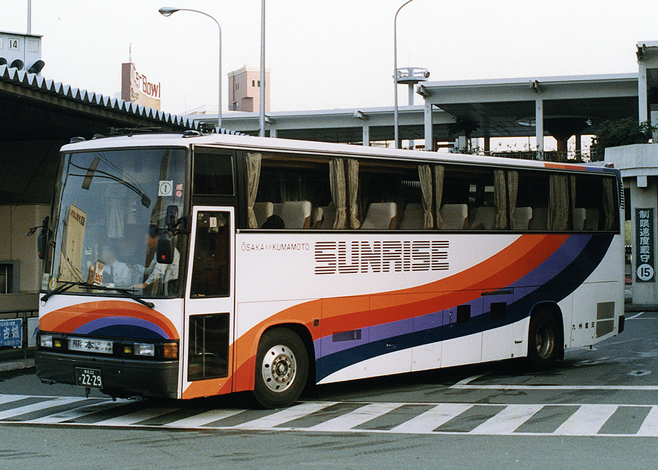 九州産業交通 サンライズ 専用車